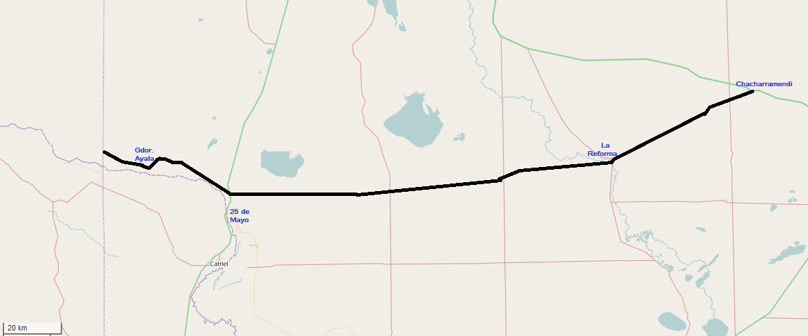 Ruta Provincial 20 La Pampa, Open Street Map